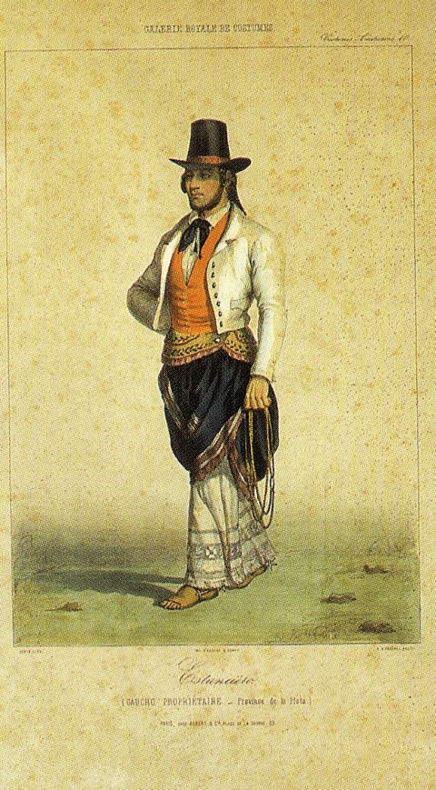 Estanciero. Impreso coloreado.